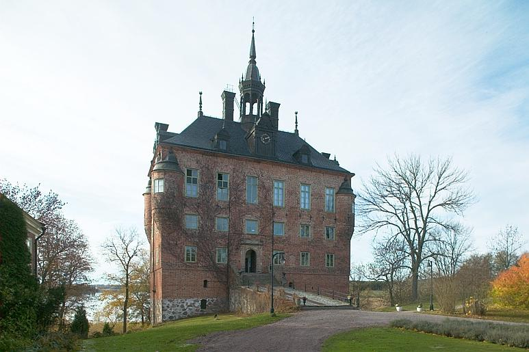 Exteriörbild. Motiv: Wiks slott Nyckelord: Byggnadsminnen Kategori: SlottExteriörbild.